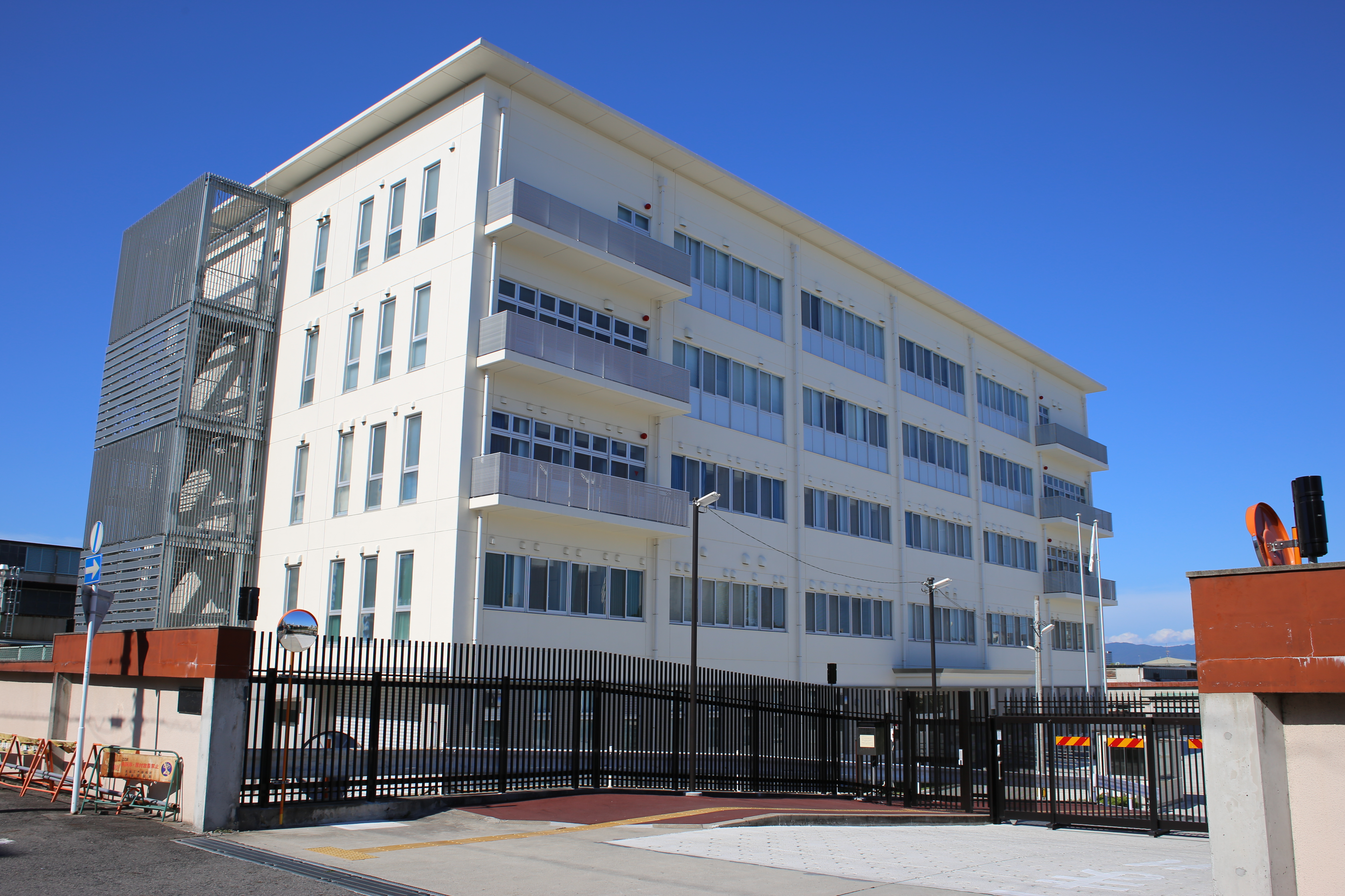 名古屋市名東区・長久手市境に所在する名古屋市交通局藤が丘工場を西側公道より撮影